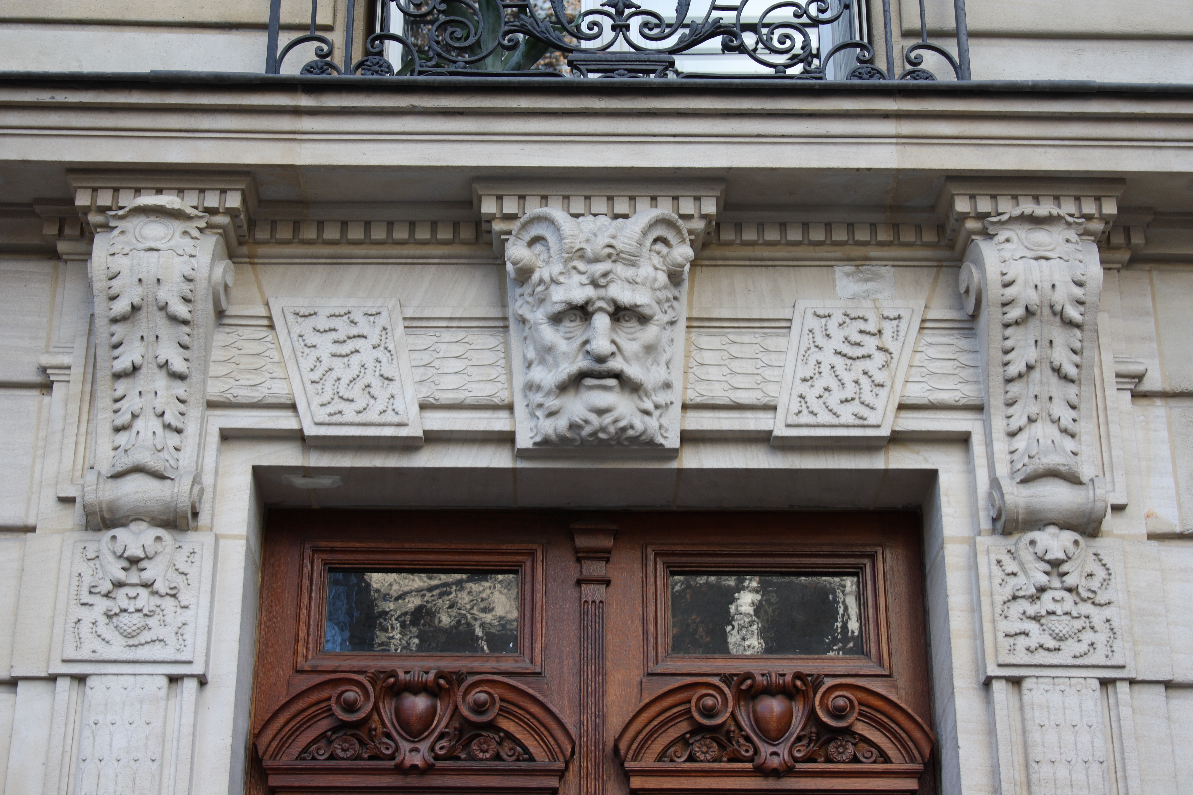 Haus Nr. 15, rue Joseph Bara in Paris (6. Arrondissement), Mascaron